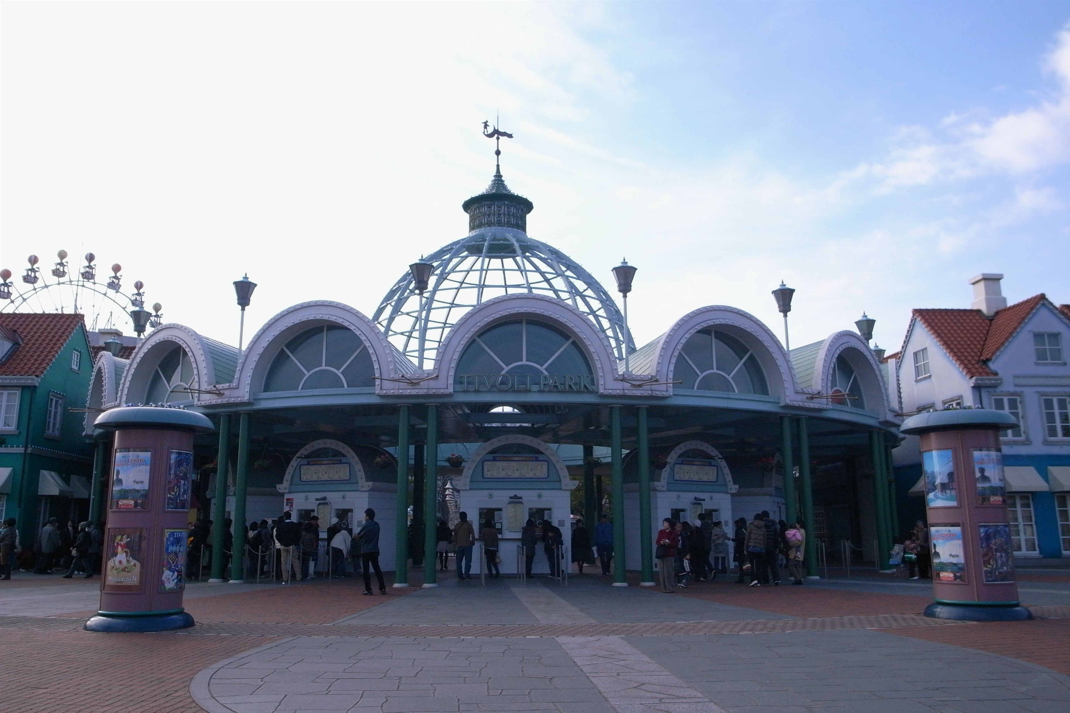 Kurashiki Tivoli Park in Kurashiki, Okayama, Japan.